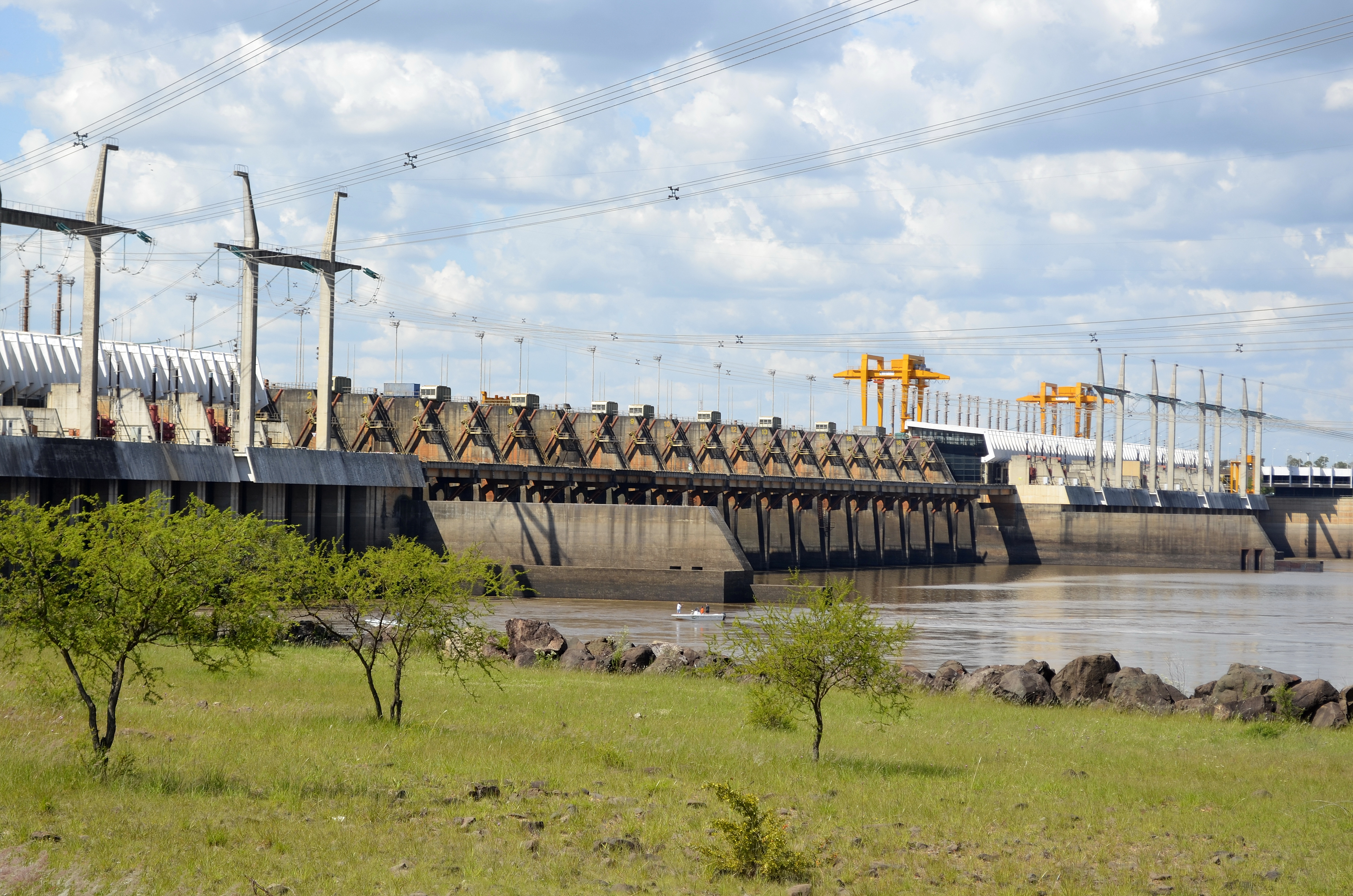 Represa, El Nº 10 separa Argentina de Uruguay Imaginariamente